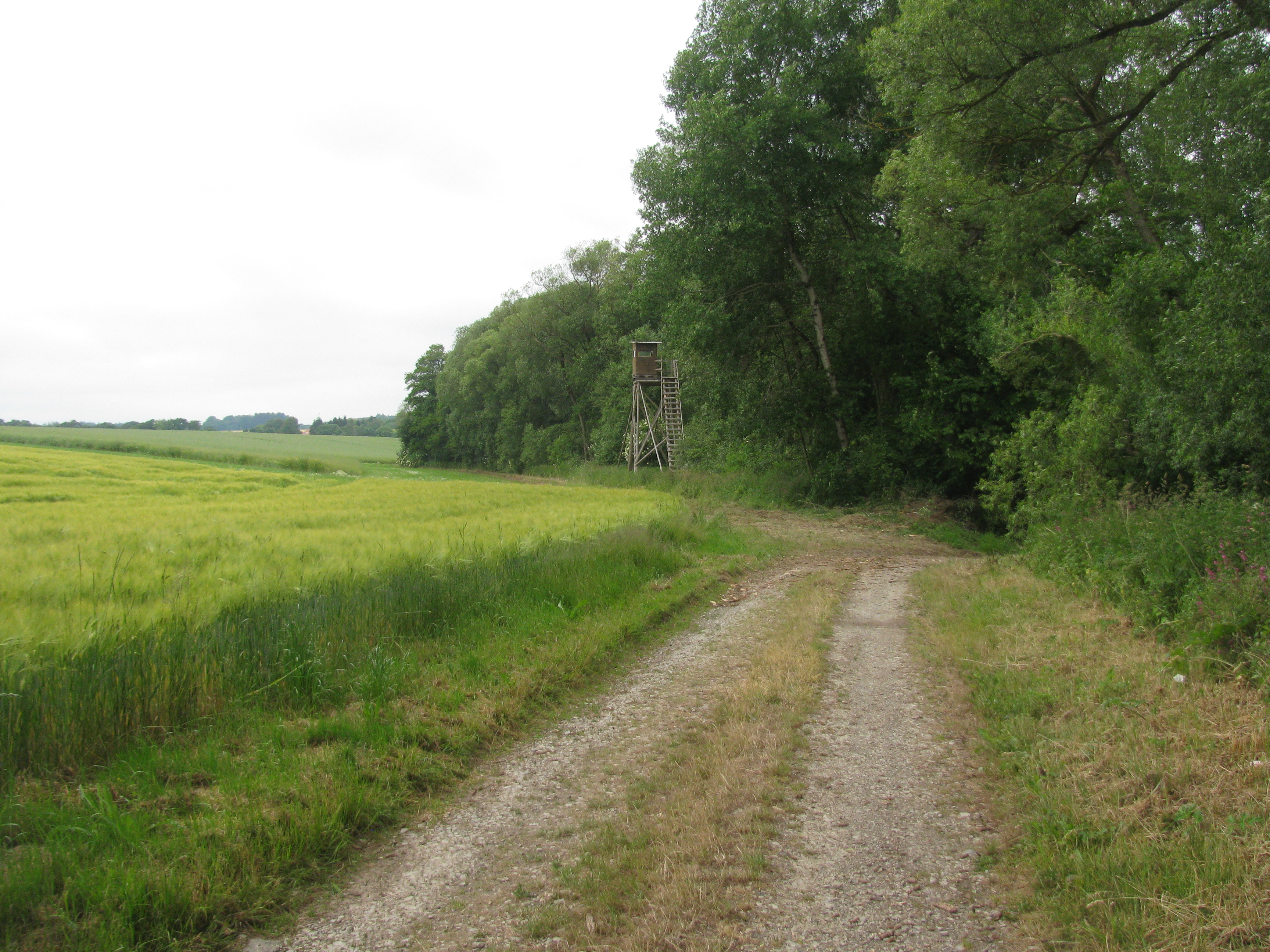 der Bach Holzape nördlich der Beberbecker Hute ist hier Teil des FFH-Gebiets 4422-350 „Holzapetal“.